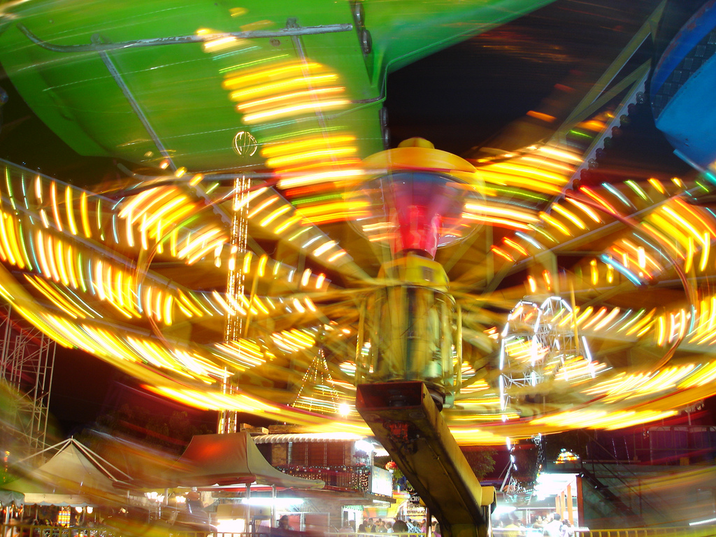 Parque Italo Americano, La Bandera. Caracas